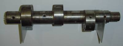 Wanke NSU 619 rotor shaft for 3 rotor Wankel rotary engine, Exzenterwelle für Wankel NSU 619 Dreischeiben Wankelmotor.